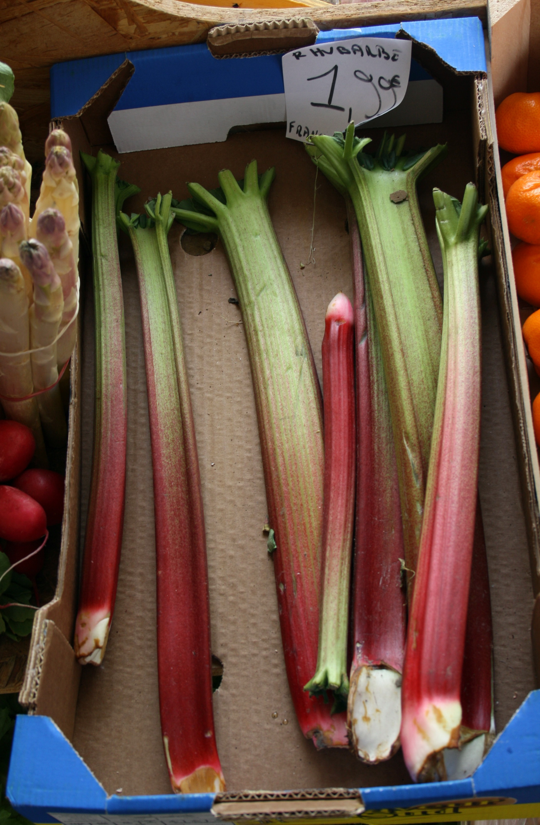 Rhabarber im Gemüsegeschäft angeboten.